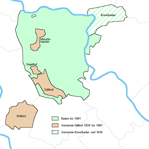 Territoriale Entwicklung der Stadt Baden (Schweiz)